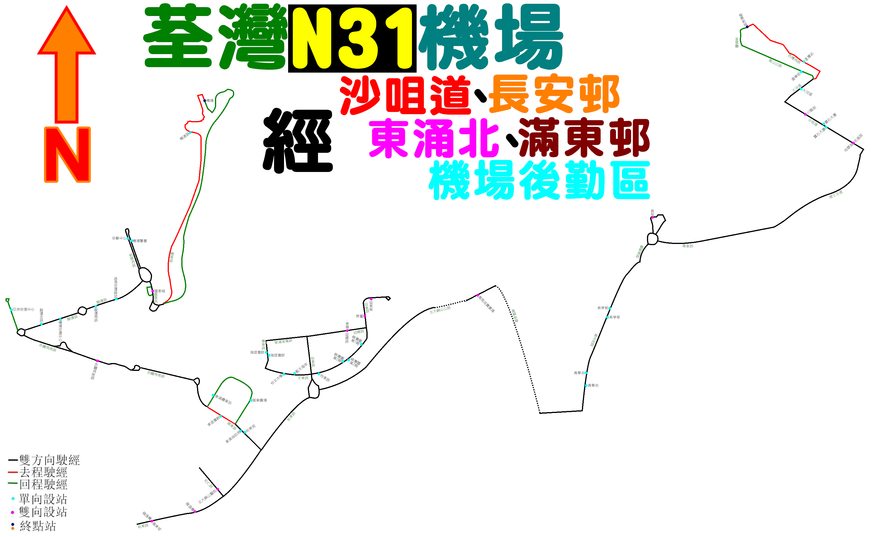 中文（香港）: 龍運巴士N31線的走線圖